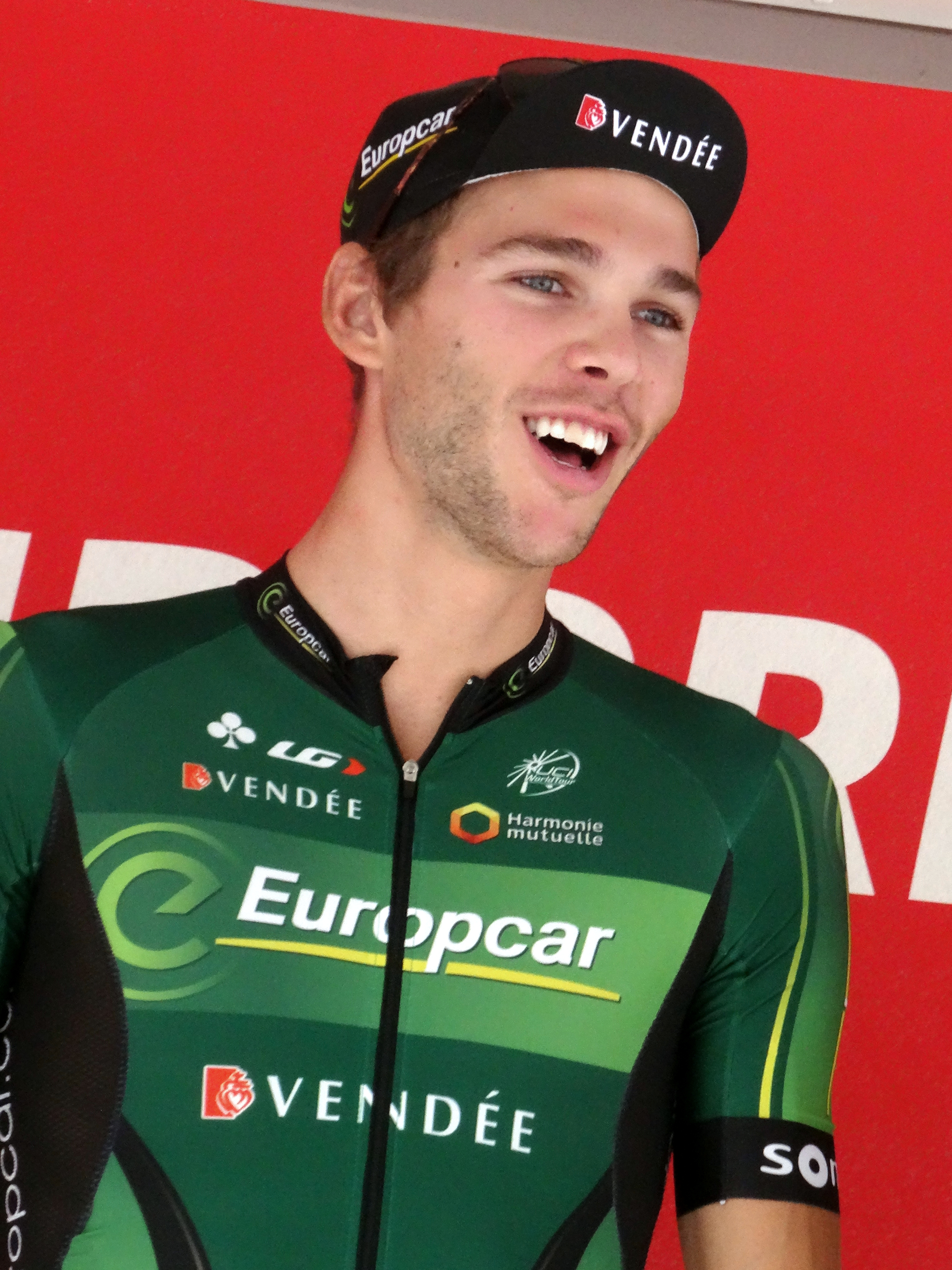 Reportage photographique réalisé le samedi 26 juillet à l'occasion du départ de la première étape du Tour de Wallonie 2014 à Frasnes-lez-Anvaing, Belgique.